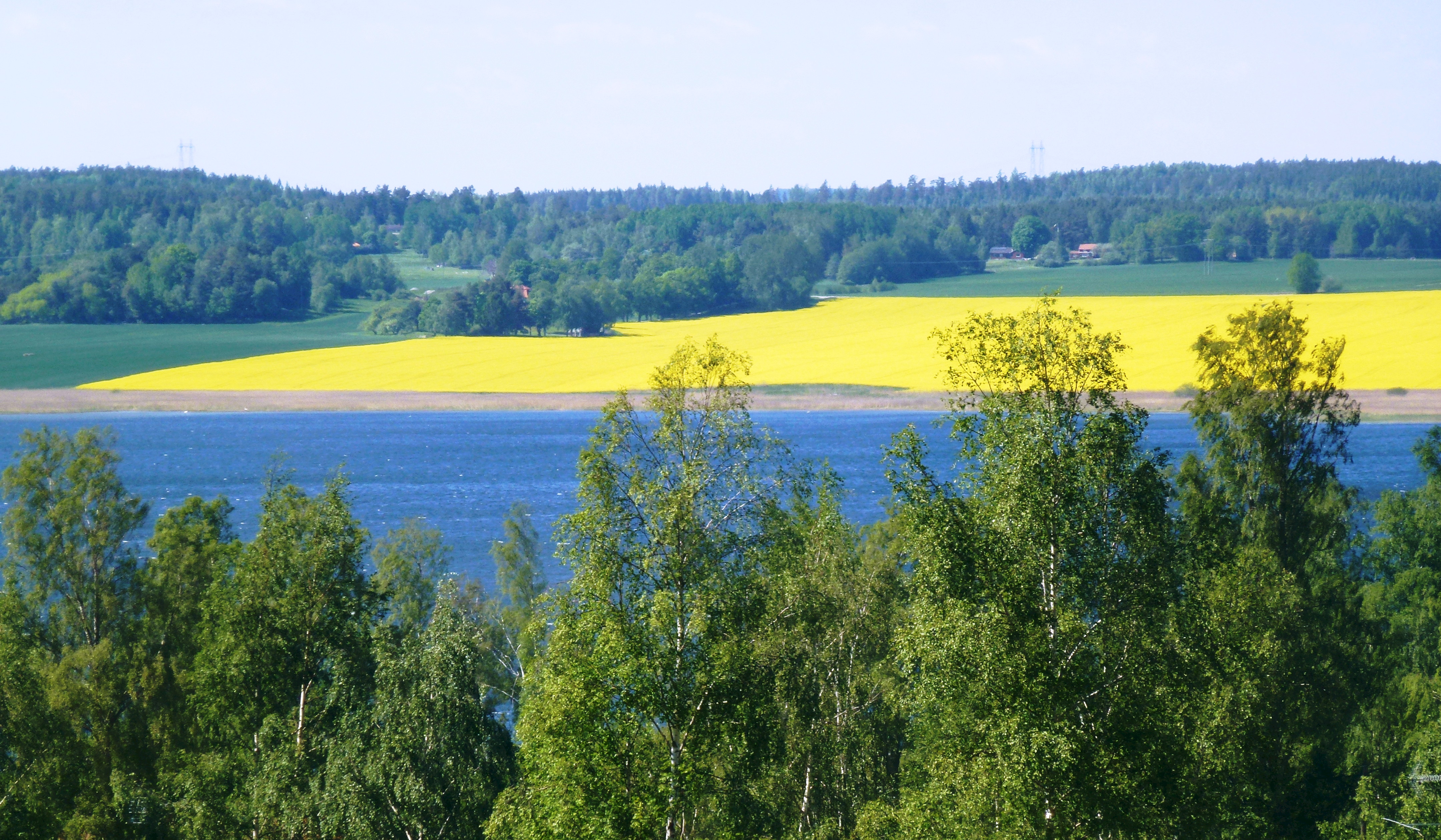 Kaggfjärden, vy mot norr och Kagghamra gård